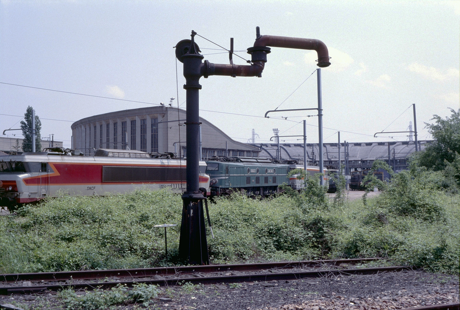 Le dépôt SNCF de Villeneuve-Saint-Georges le 2 juin 1985 avec les CC 6572, 2D2 9108, et BB 7389.